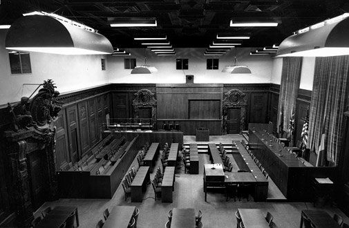 Das zerstörte und befreite Nürnberg im April 1945